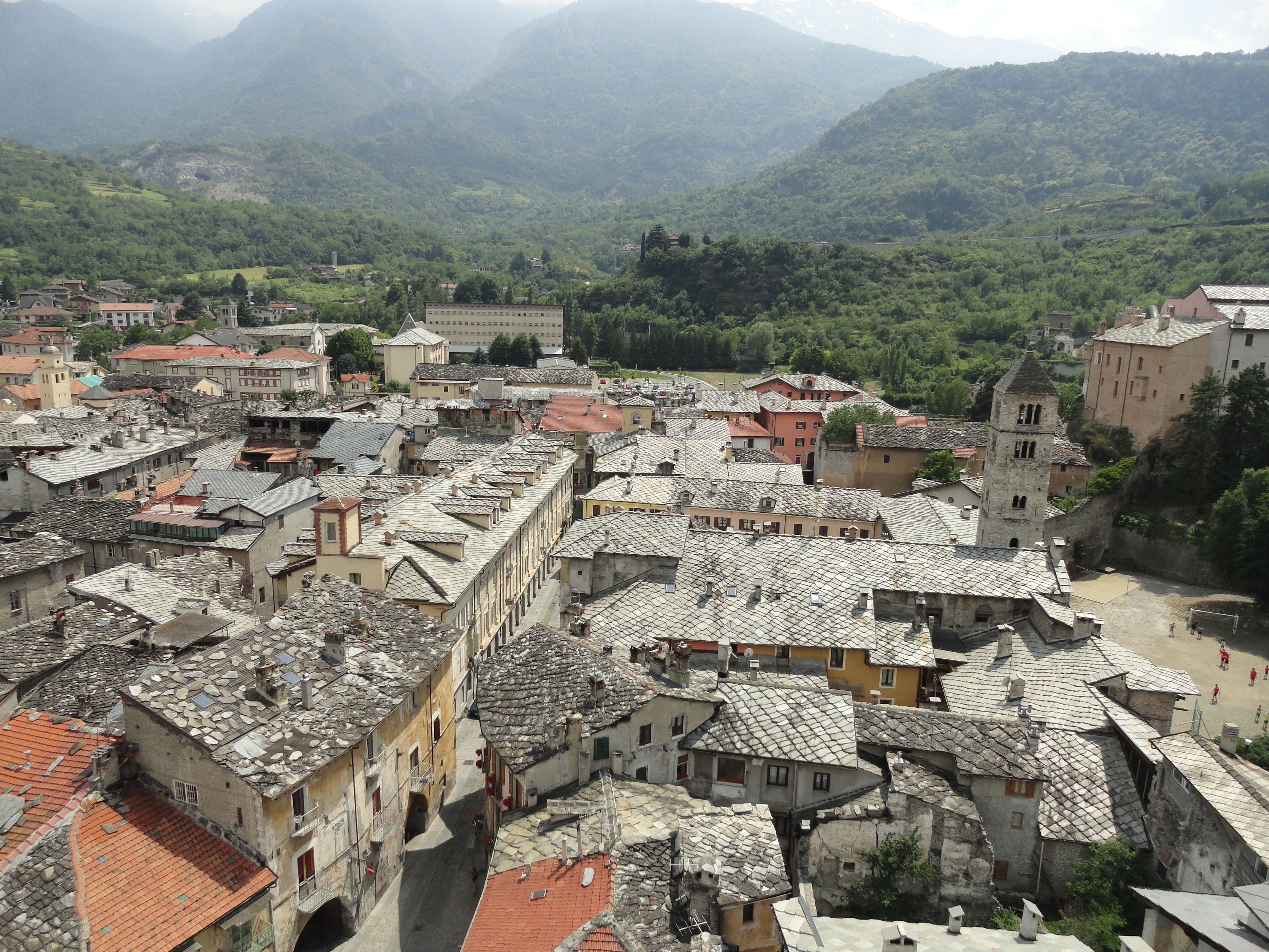 Il complesso della pieve battesimale di Santa Maria Maggiore vista dal campanile di San Giusto